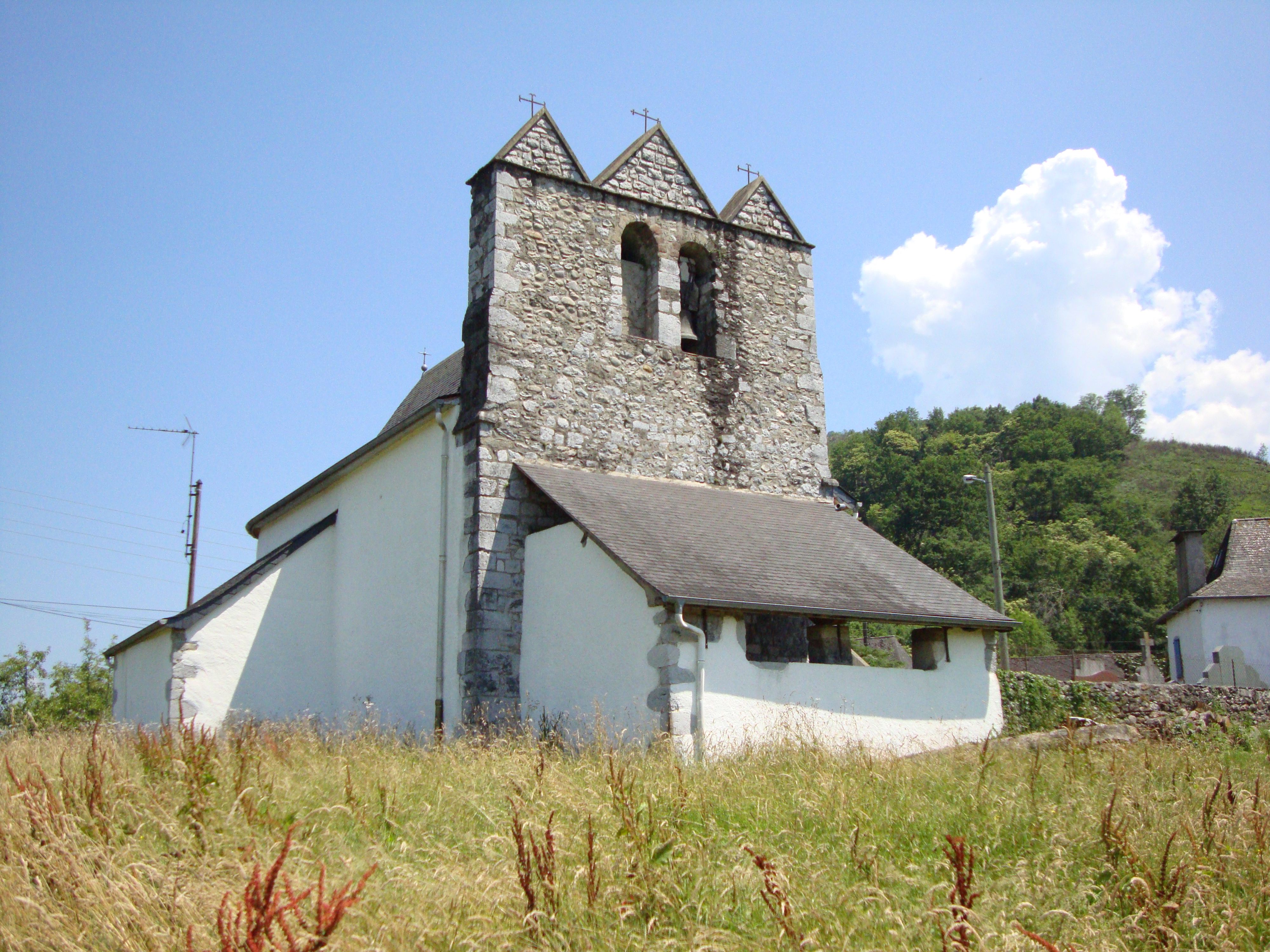 Restoue (Laguinge-Restoue, Pyr-Atl, Fr) l'église trinitaire coté portail